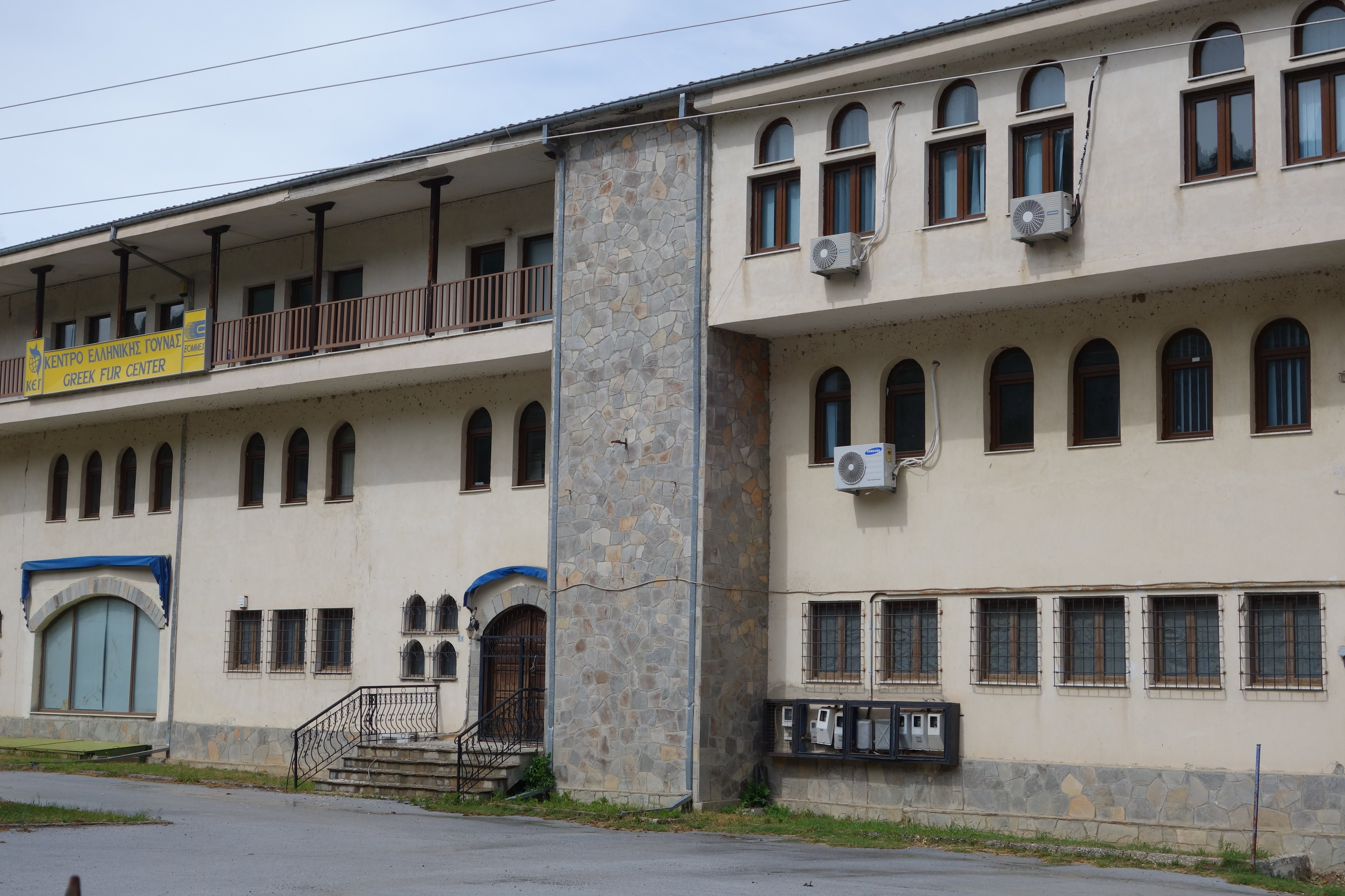 Kürschner in der Präfektur Kastoria, Griechenland. Greek Fur Center. Siehe auch Kürschner in der Stadt Kastoria und Kürschner in der Stadt Siatista.